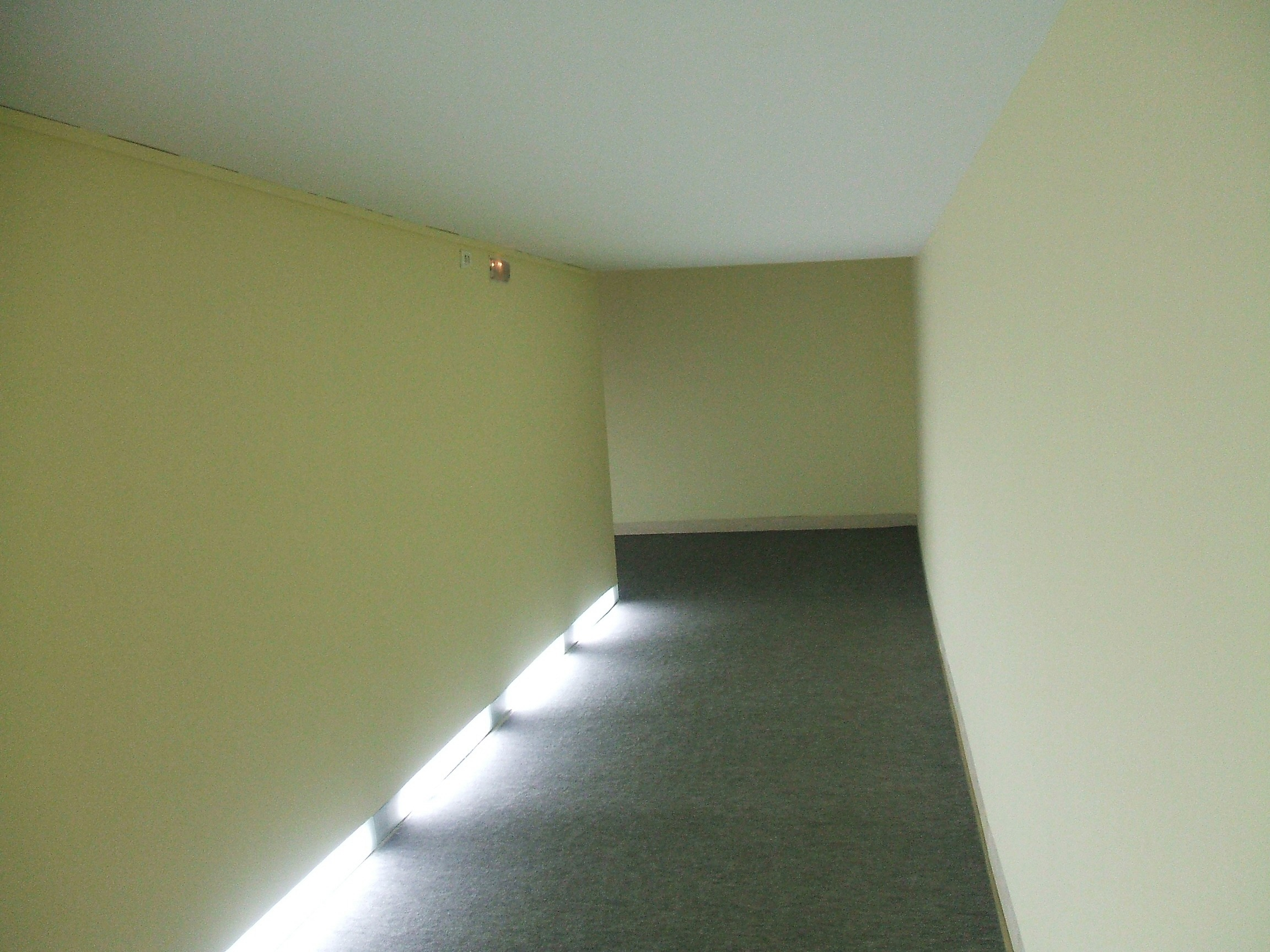 Centro Cultural Montehermoso, Vitoria-Gasteiz, Euskadi, España/Spain